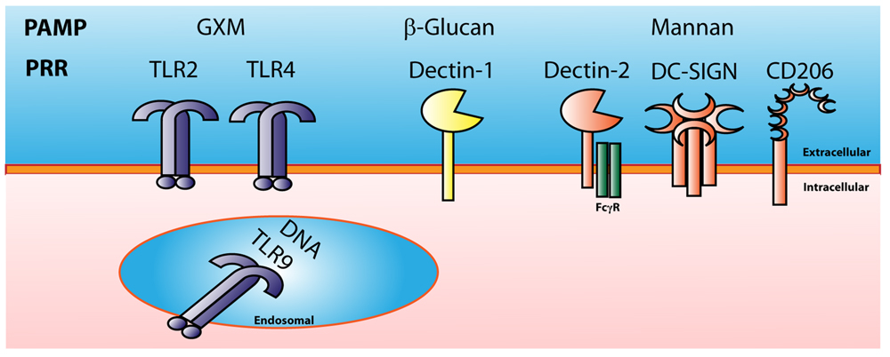 Motifs moléculaires associés aux pathogènes et récepteurs de reconnaissance de motifs moléculaires chez le Cryptococcus. Le cryptococcus possède plusieurs motifs moléculaires associés aux pathogènes et les récepteurs de reconnaissance de motifs moléculaires ne sont pas spécifiques d'une famille de microbe. Par exemple le Toll-like récepreur TLR4 reconnait aussi les bactéries gram négatives